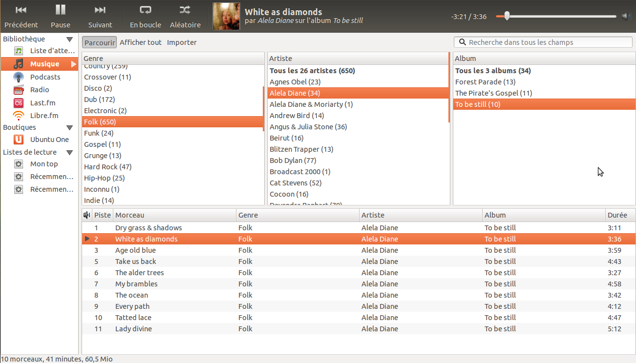 Capture d'écran d'une lecture d'un morceau sous Rhythmbox. Version 2.98 installée sous Linux Ubuntu 12.04 LTS